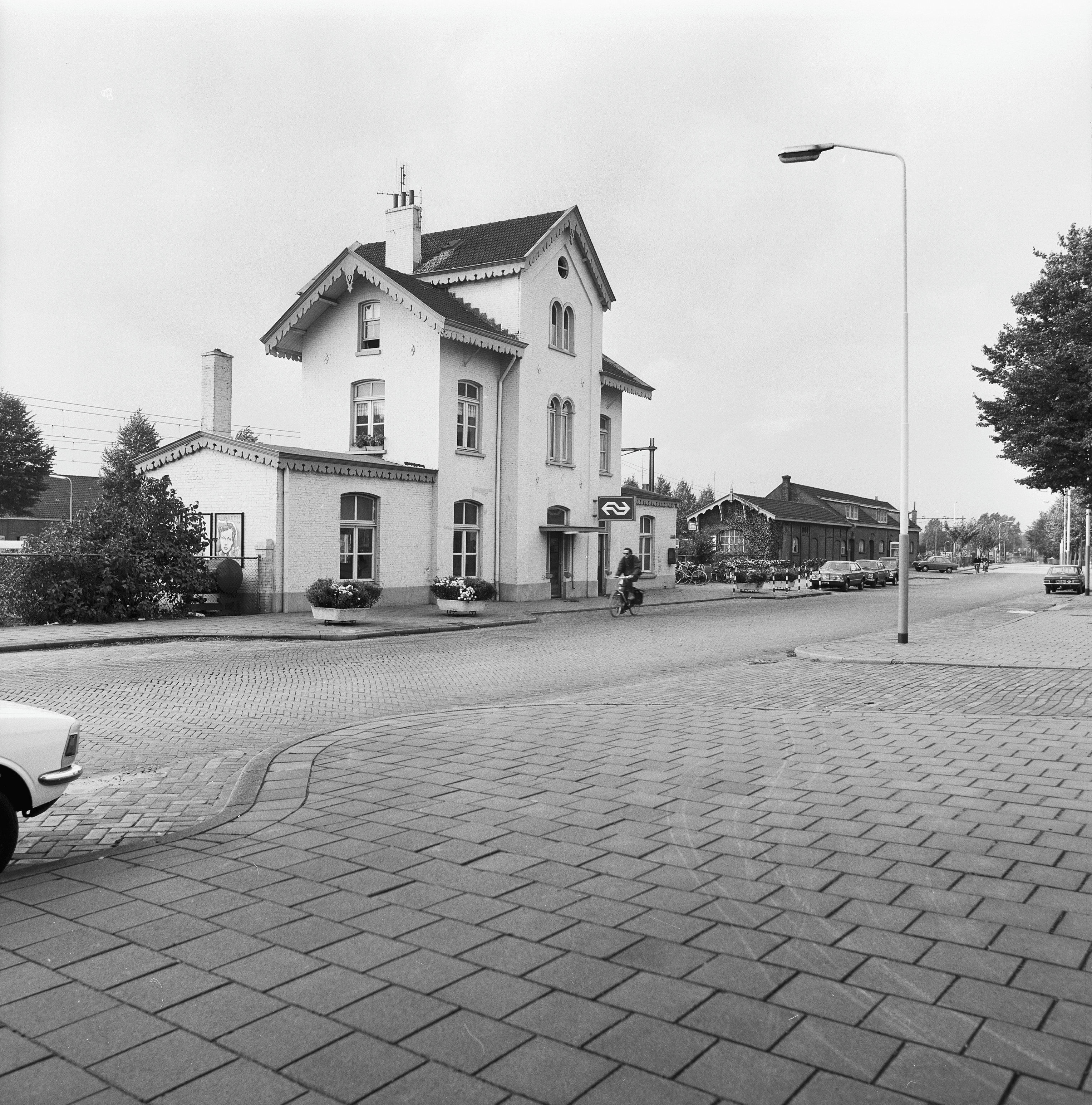 Station N.S: overzicht